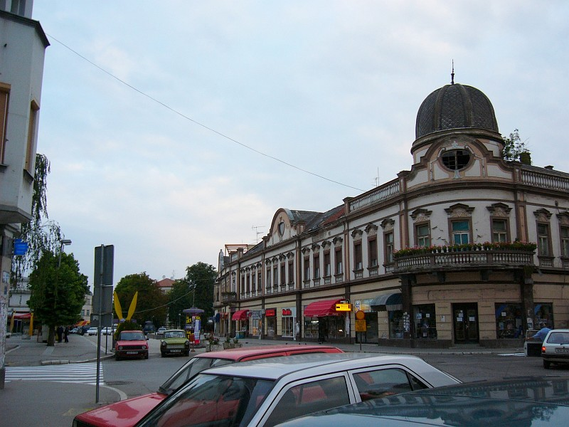 Brcko